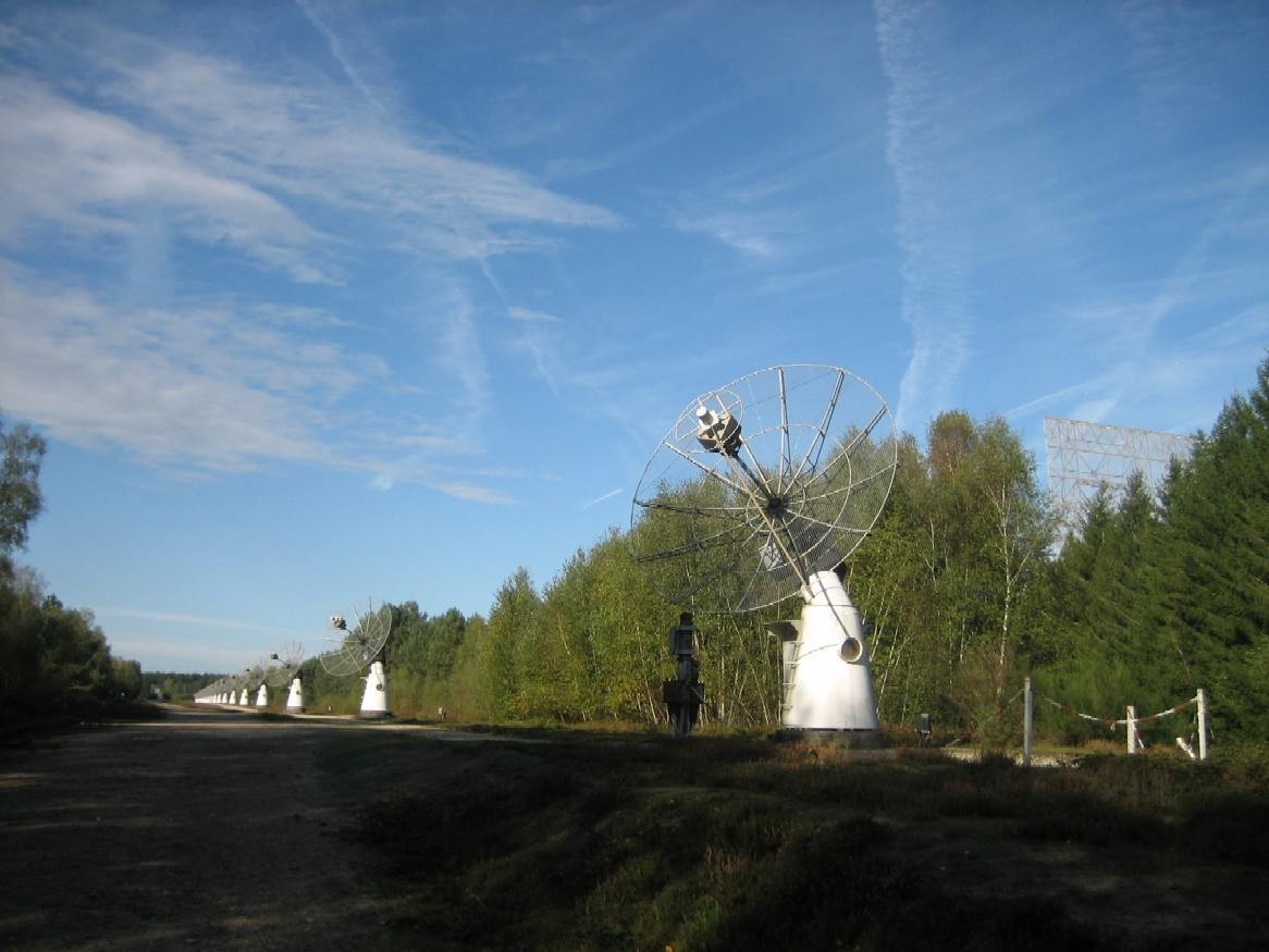 Alignement de radiohéliographes